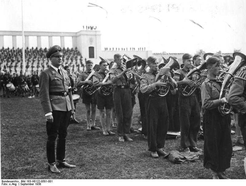 10. Reichsparteitag der NSDAP vom 6.-12. September 1938 in Nürnberg UBz: den Reichsleiter Baldur von Schirach, Reichsjugendführer der NSDAP bei der Generalprobe der Hitler-Jugend zum Reichsparteitag im Stadion in Nürnberg. H 0122/501/ 1 N